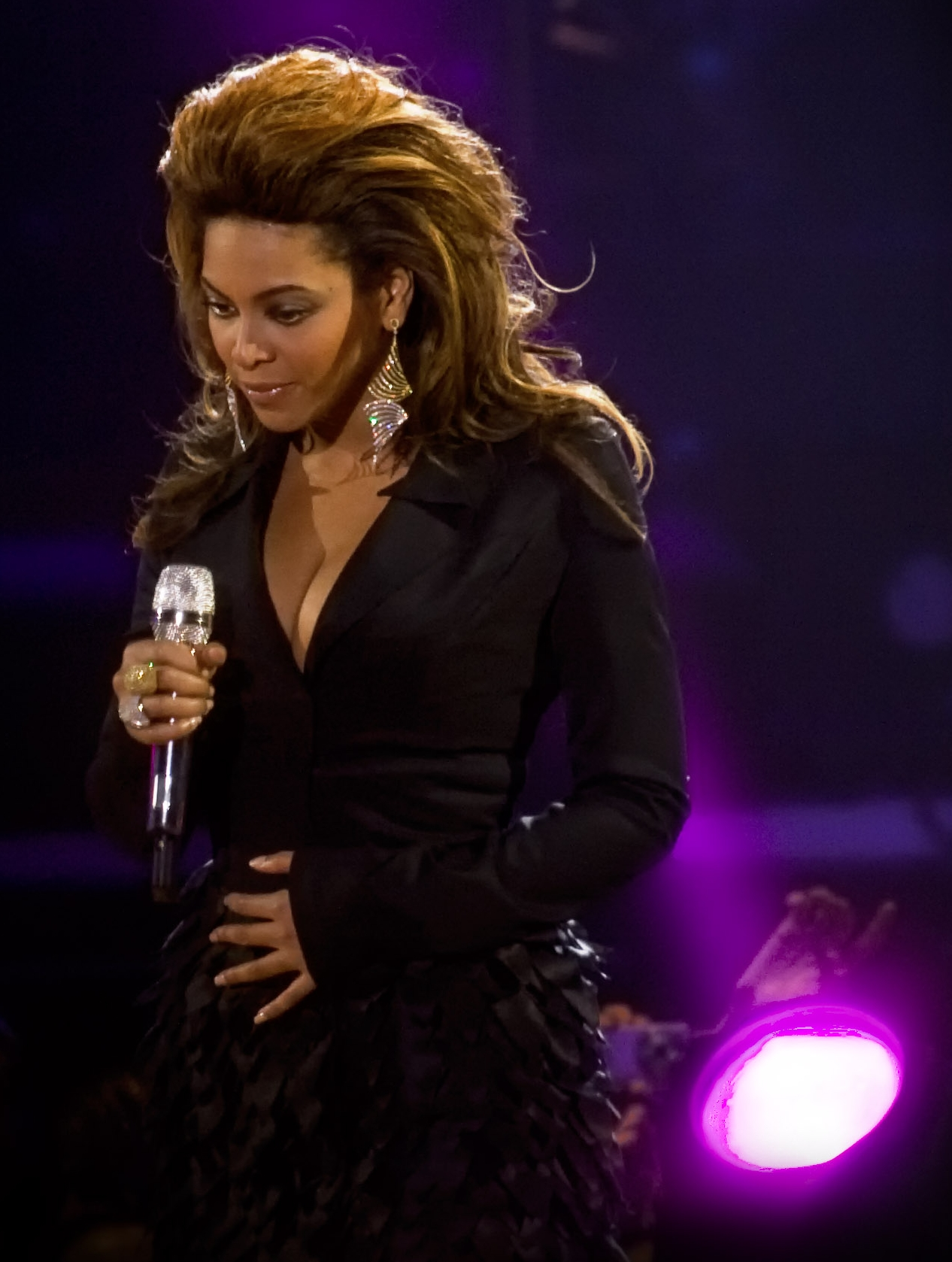 Beyoncé Premios 40 Principales Palacio de los Deportes 12.12.08 Madrid